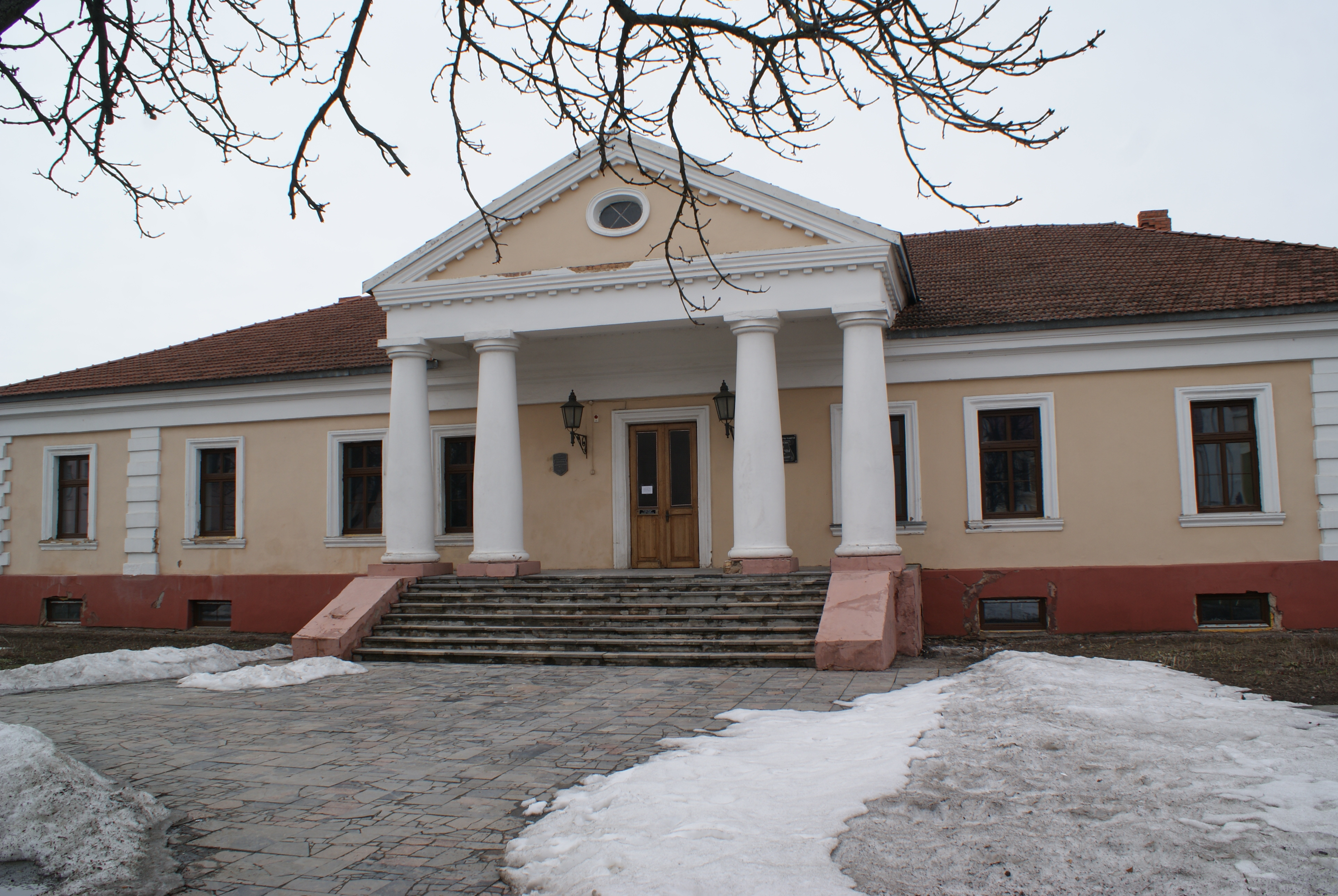 Слуцкі краязнаўчы музей